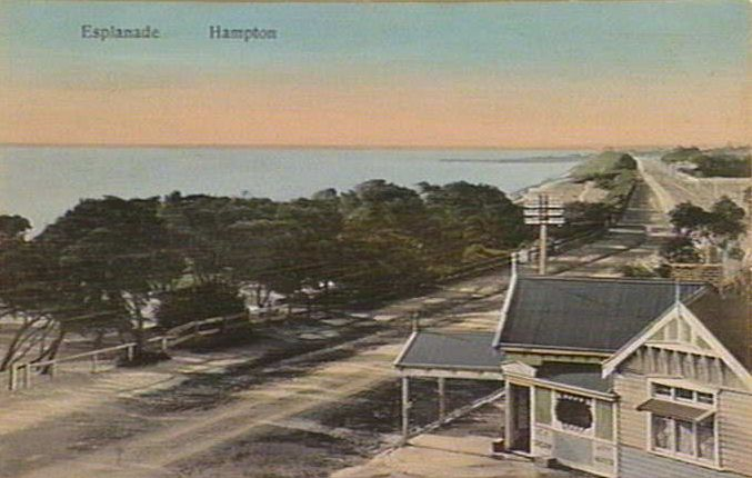 Esplanade Hampton, Victoria. 1908.